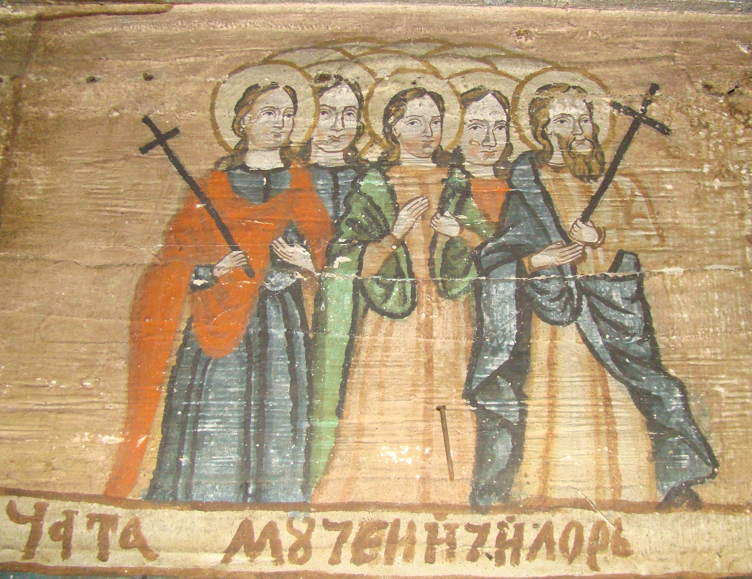 Biserica de lemn "Cuvioasa Paraschiva" , sat POIENILE IZEI; pronaos - ceata mucenicilor